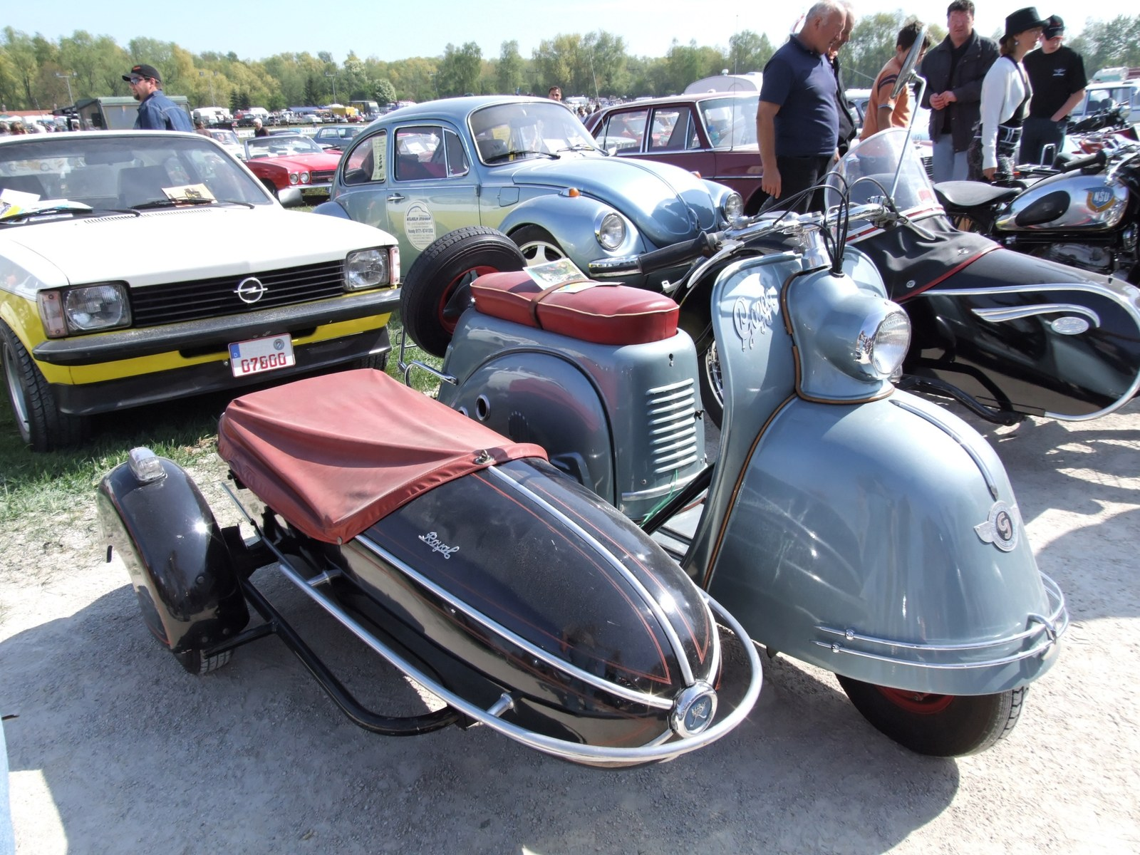 Quelle: selbst fotografiert, 04/2007 Fotograf: Späth Chr.